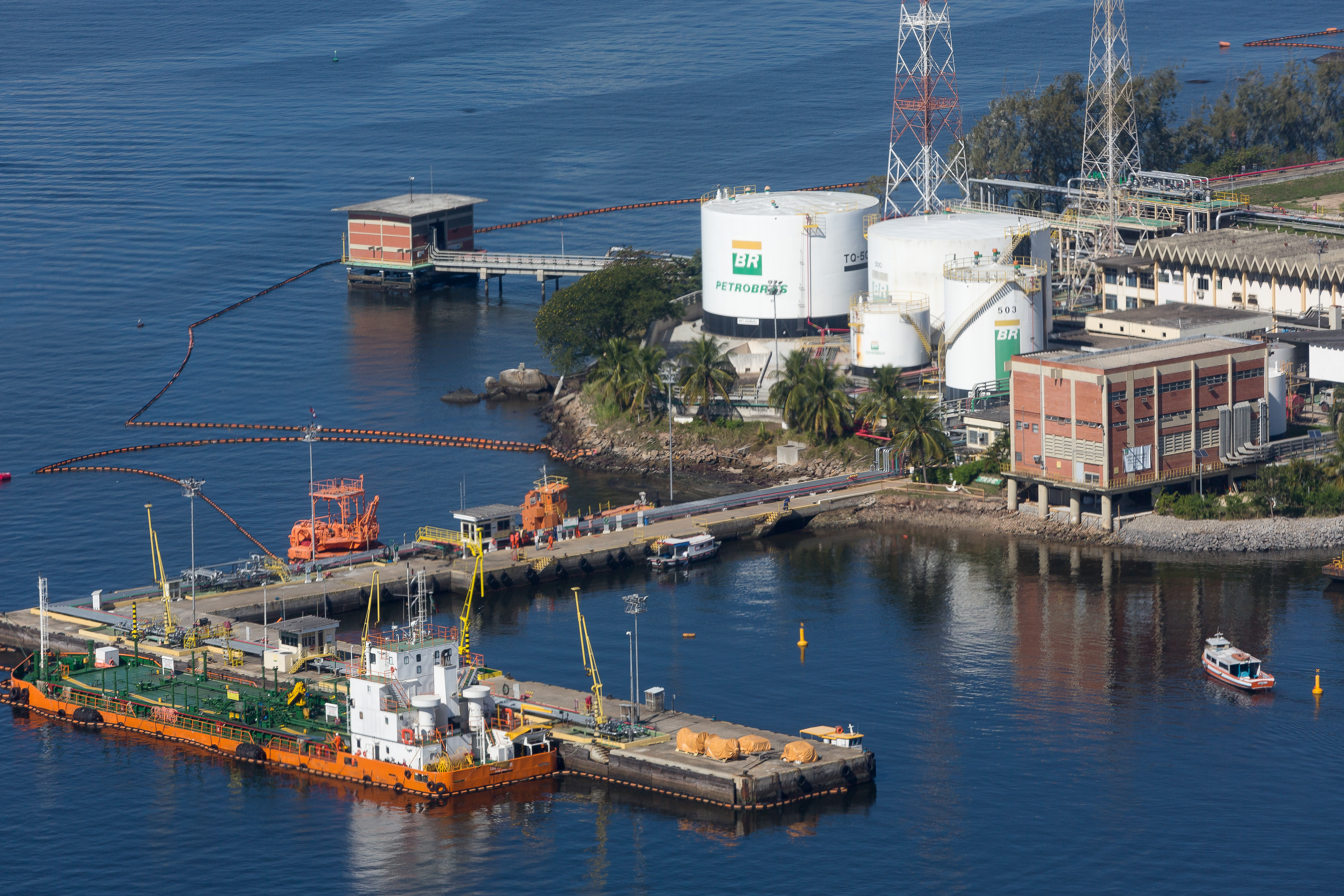 Vista aérea da Ilha D'Água com o terminal da empresa Transpetro. Rio de Janeiro - RJ - Brasil.